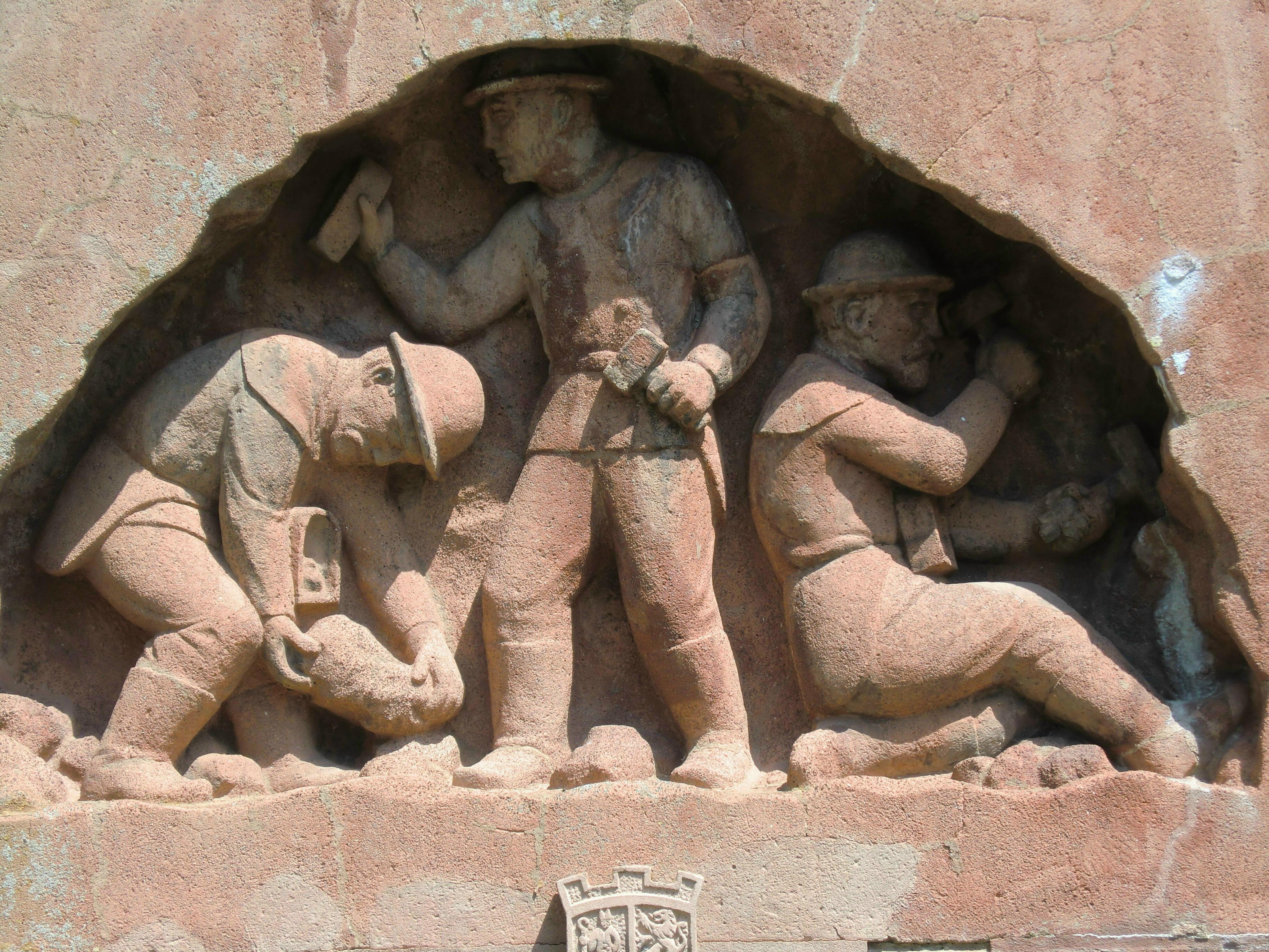 Altenberg, Bergmannsbrunnen Rathausstr. Pension "Zur Pinge" vom Dresdner Bildhauer Hans Tröger 1942 geschaffen.